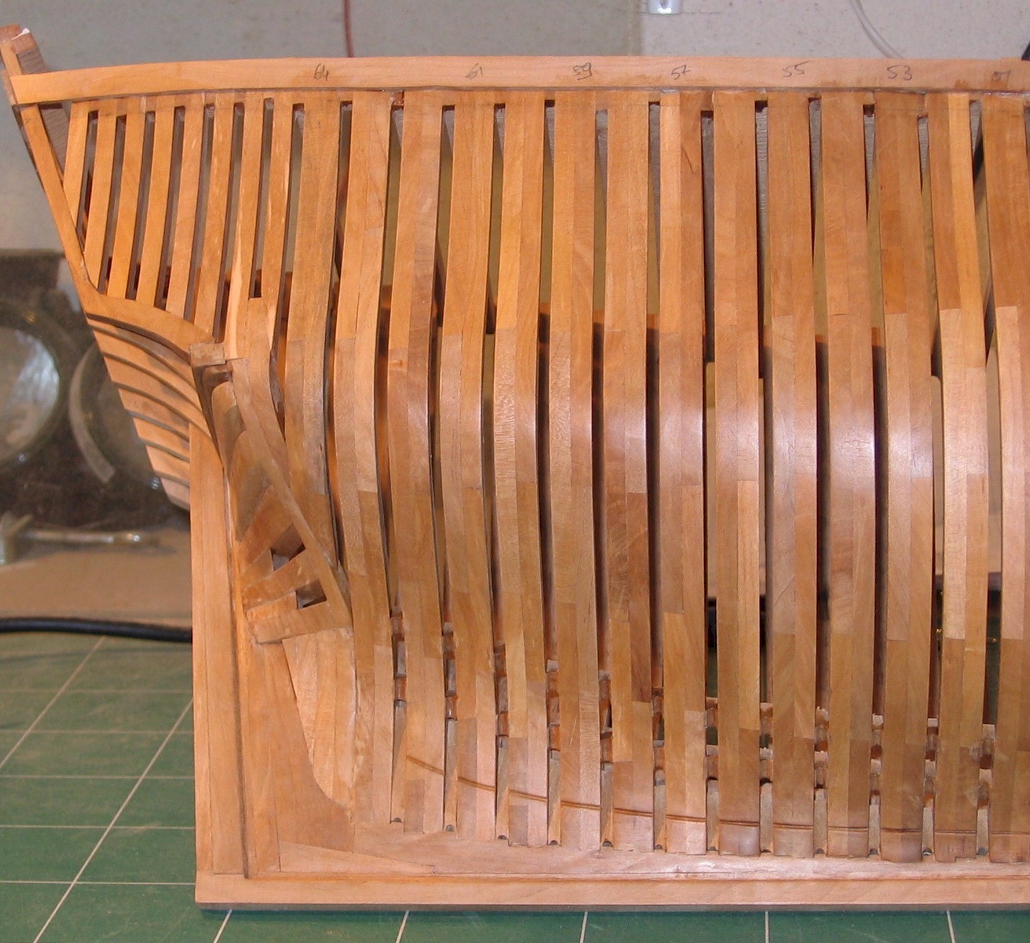 charpente de modèle d'arsenal